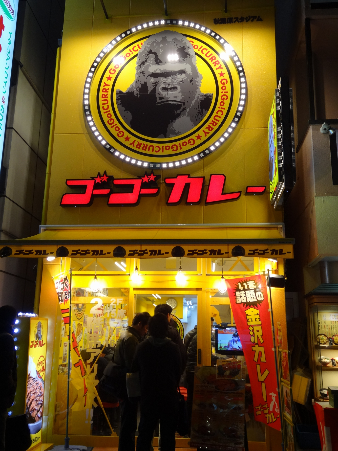 Go!Go!咖喱店鋪外觀